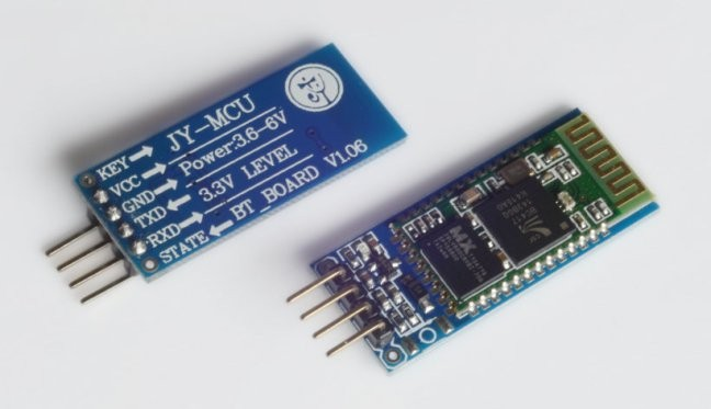 imatge mòdul bluetooth HC-06